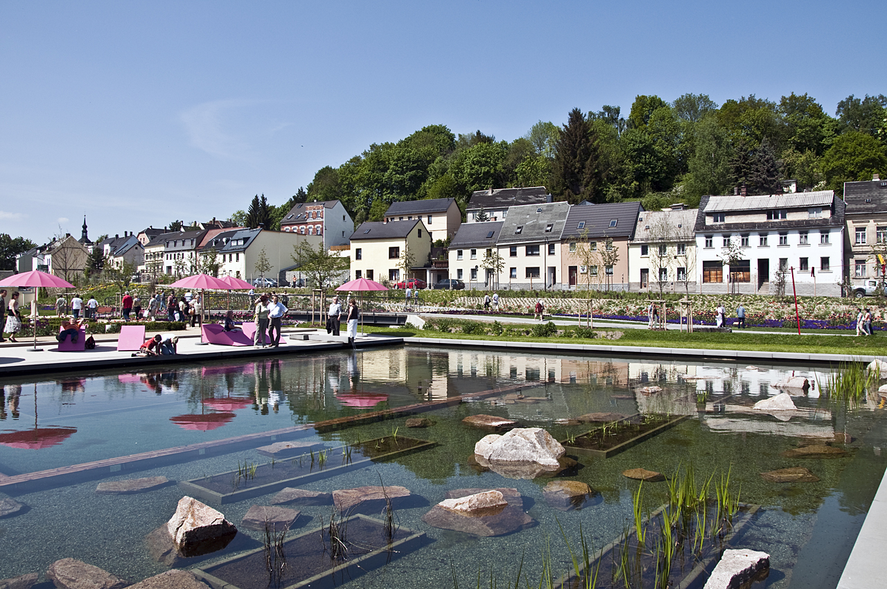 Landesgartenschau 2009 in Reichenbach im Vogtland, Pink Pool